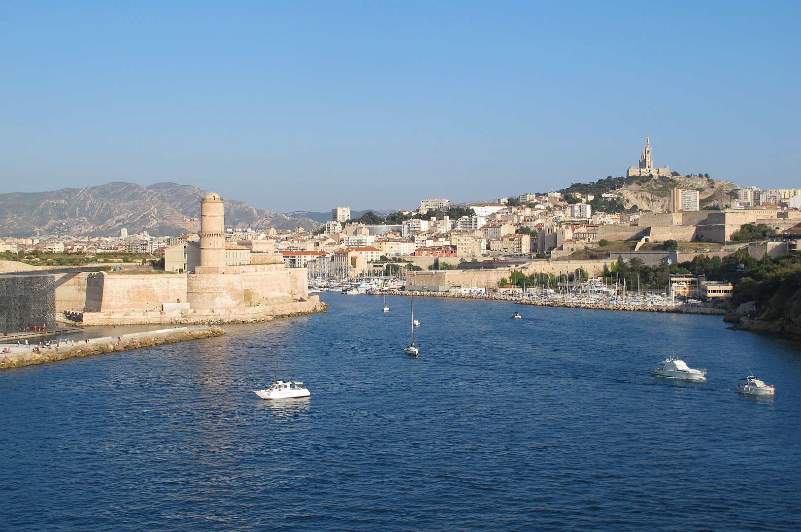 L'entrée du vieux port de Marseille le 18 juillet 2015.